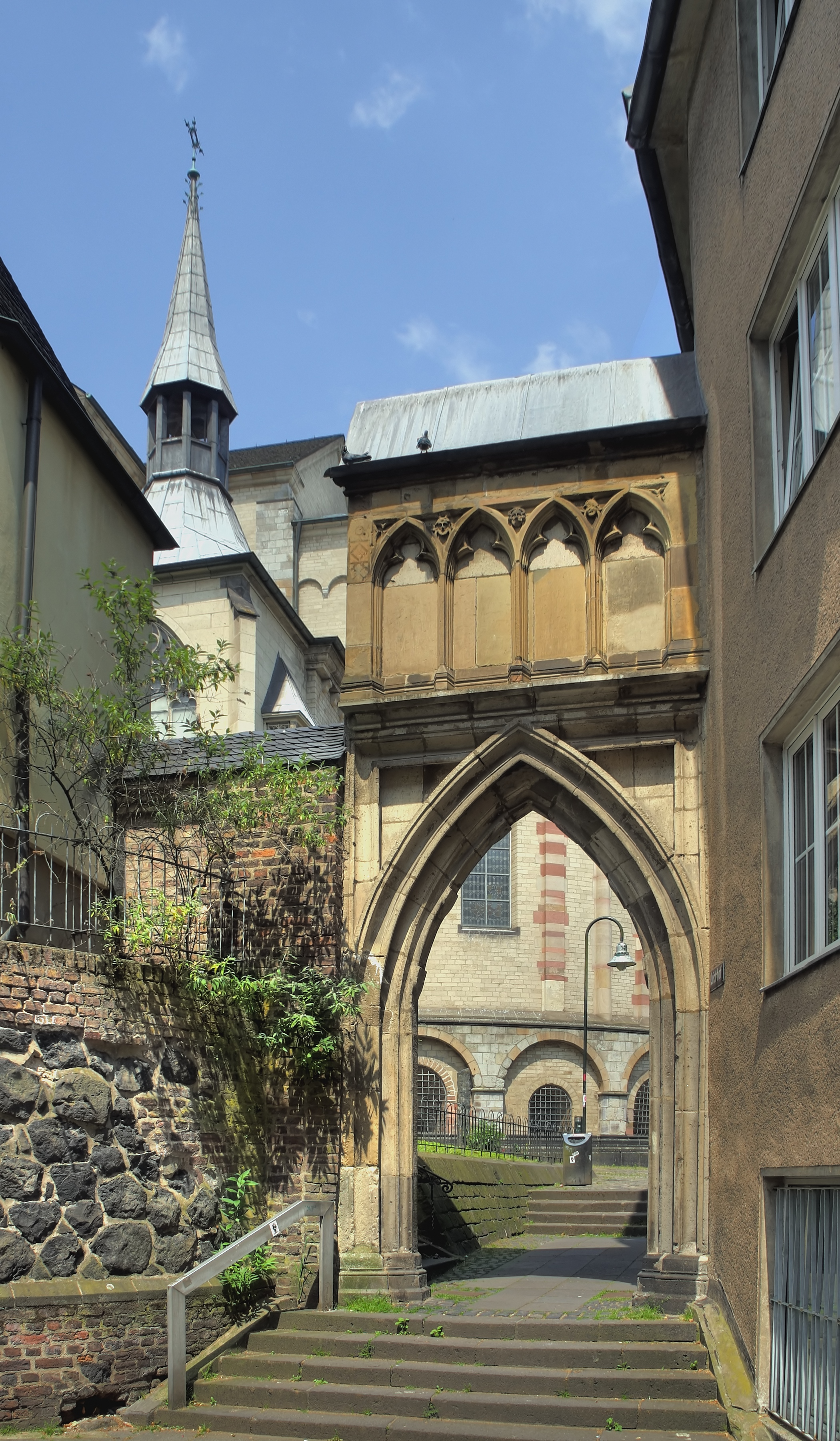 Blick durch das Dreikönigenpförtchen auf den Ostchor von St. Maria im Kapitol, Köln.